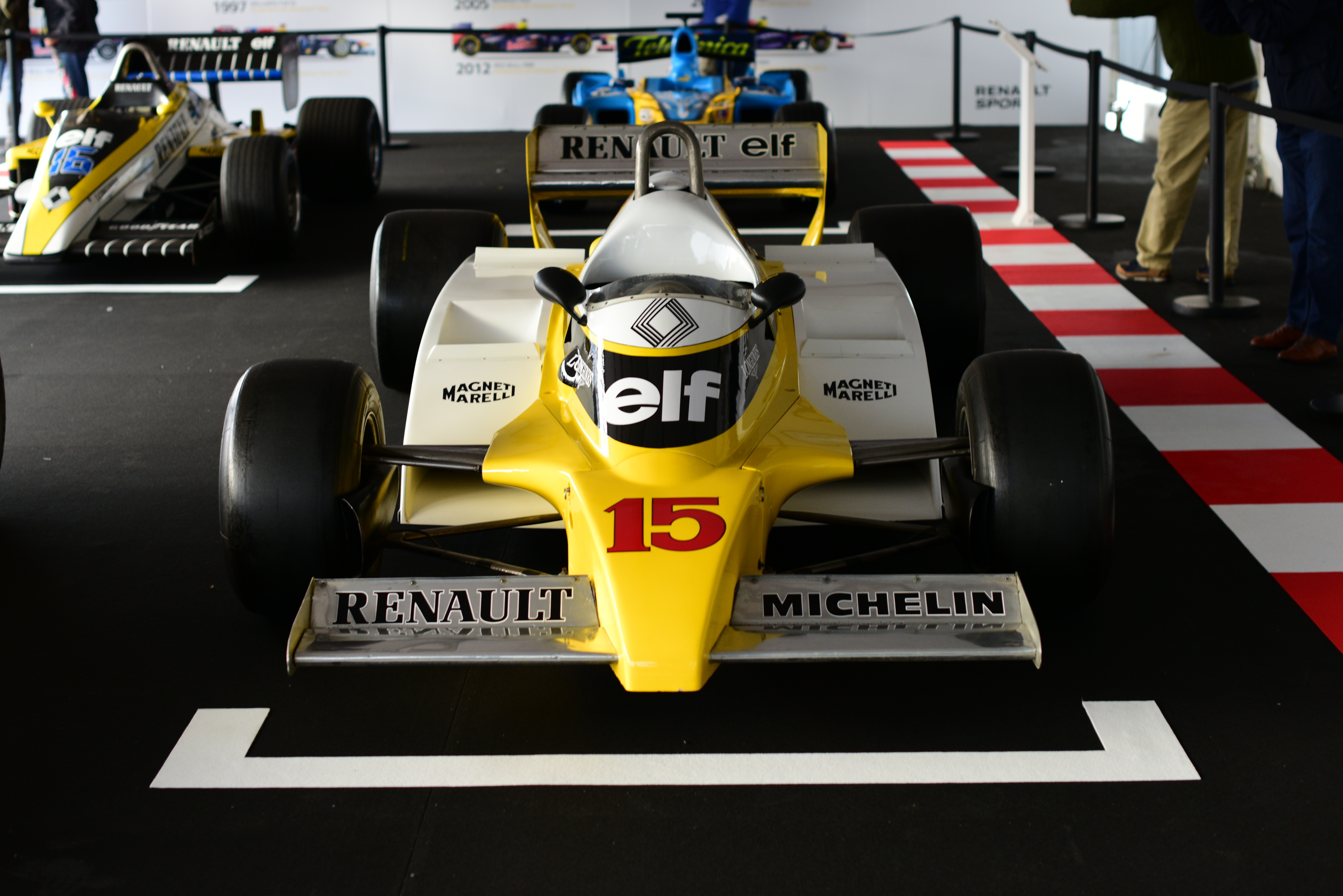 ELMS - 2016 - 4 Horas Estoril - Portugal